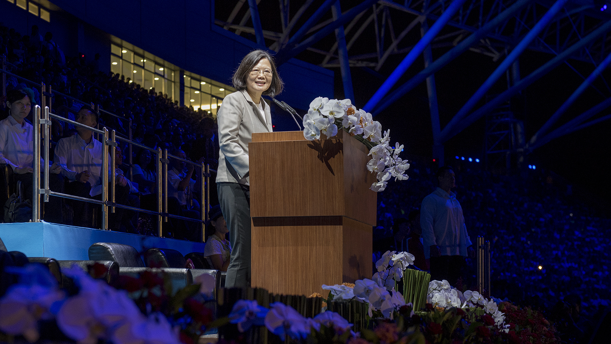 中華民國總統蔡英文出席2017臺北世界大學運動會開幕典禮，除了以地主國總統身份歡迎來自全球各國的選手代表，同時宣布本屆世大運賽事開始